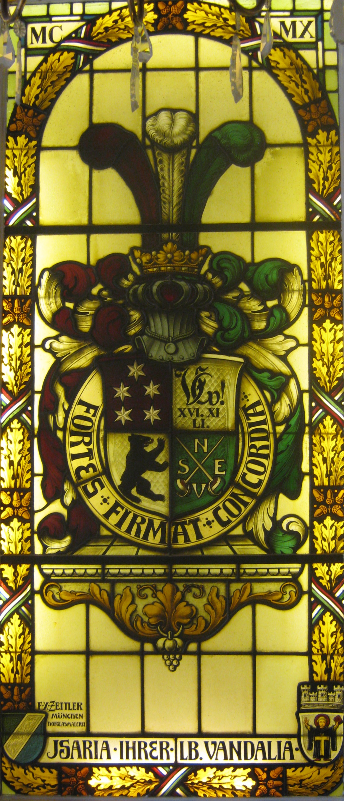 Wappenfenster für das Corps Vandalia Berlin, Geschenk des Corps Isaria München